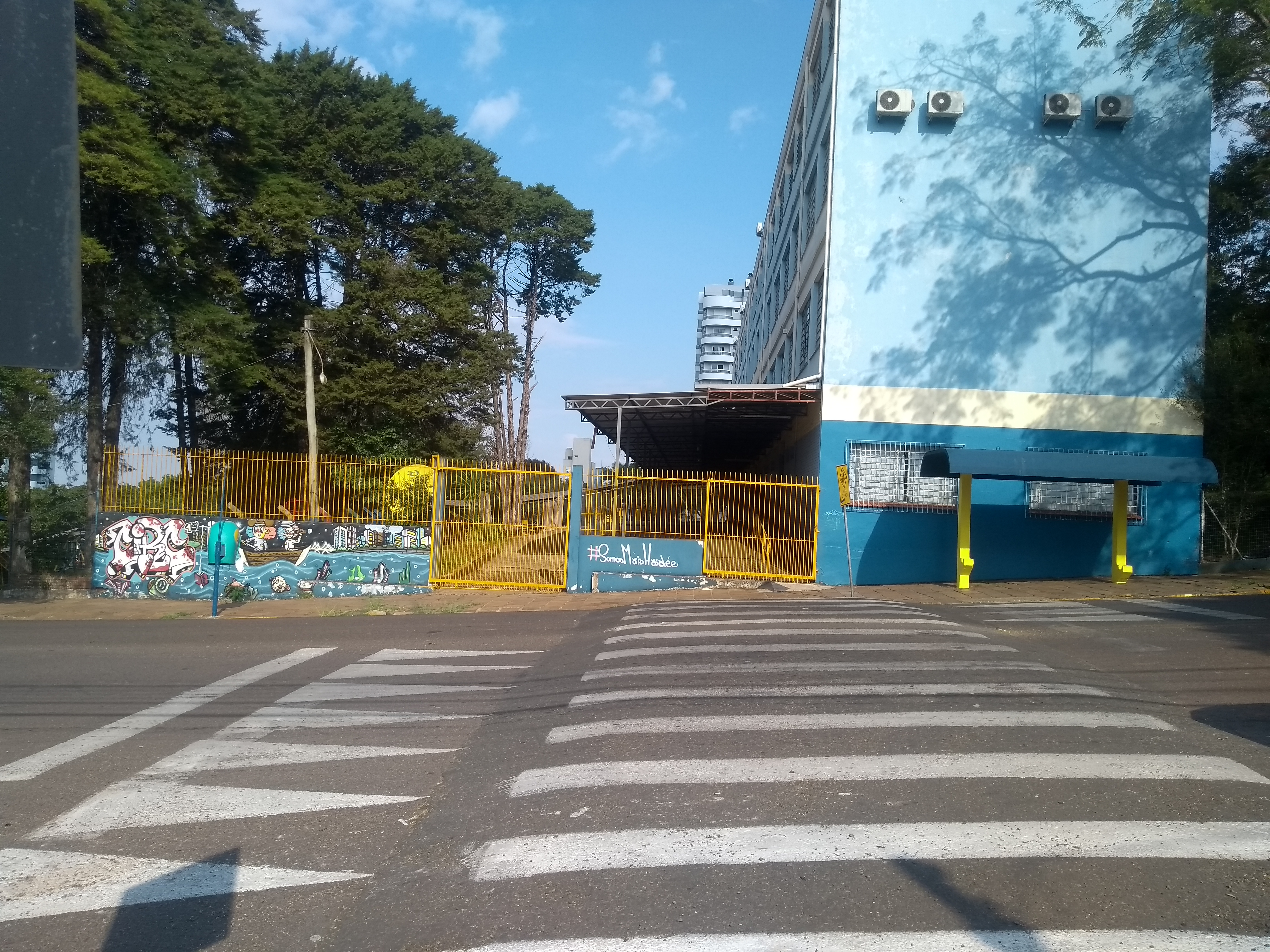 Fachada do Colégio Haidée Tedesco Reali, Erechim, Brasil